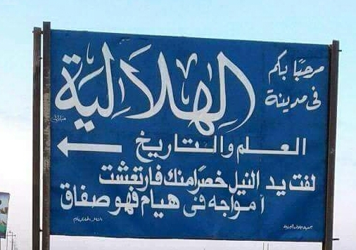 لافته بمدخل الهلالية الشرقي